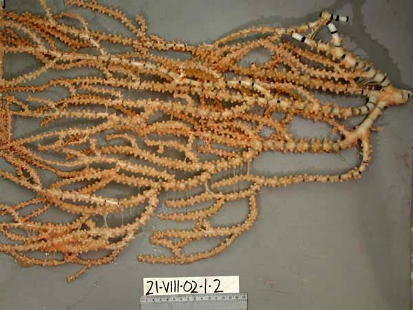 Bamboo coral Ceratoisis flexibilis (Anthozoa : Alcyonaria : Alcyonacea : Calaxonia : Isididae)